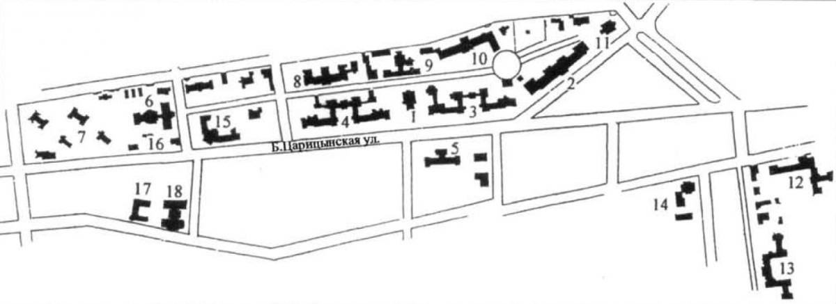 План Клинического городка Московского университета на Девичьем поле на начало 1900 года